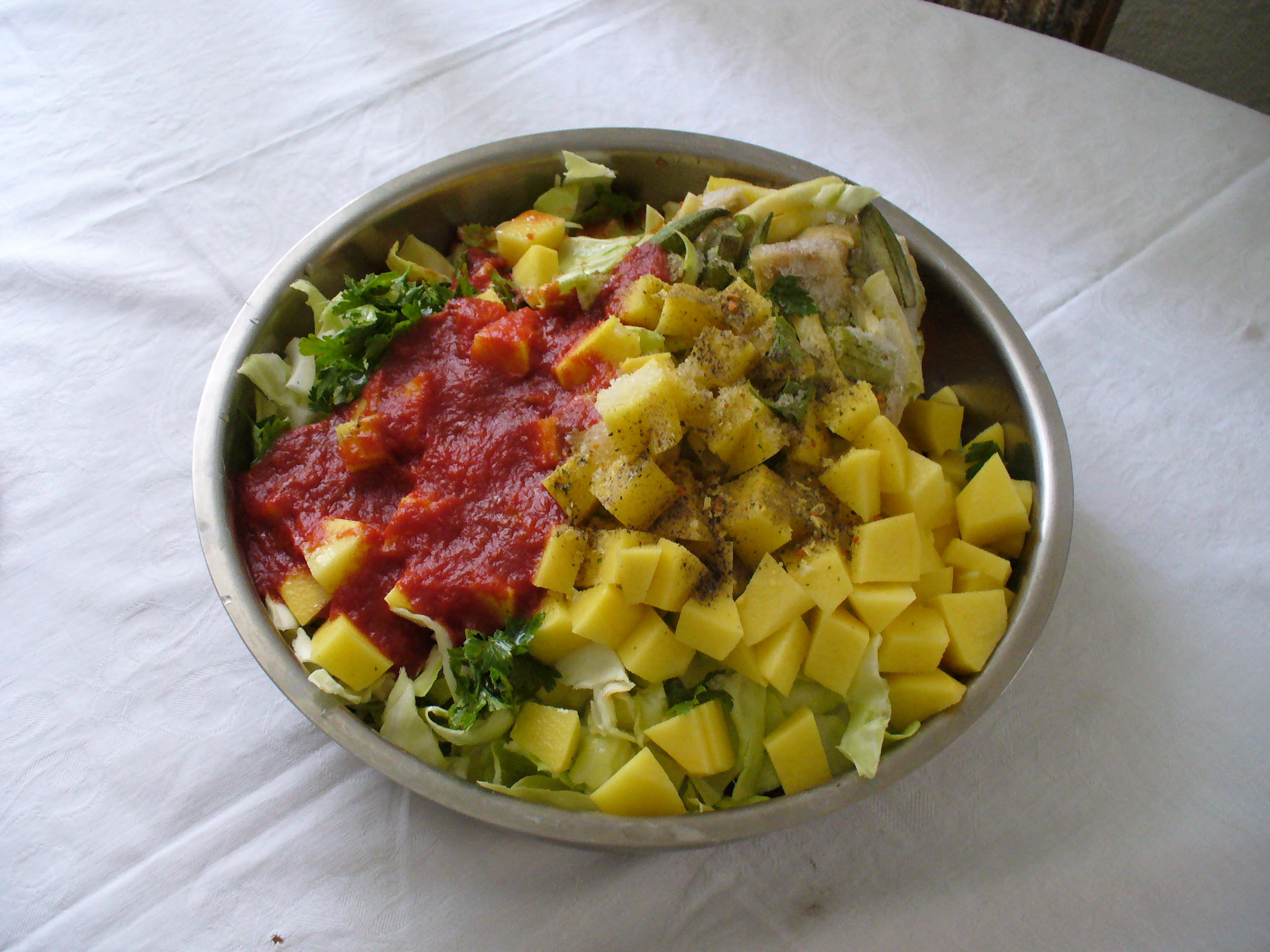 Пред да се приготви. Слики од тоа како изгледа зготвена, се разбира - нема! :)